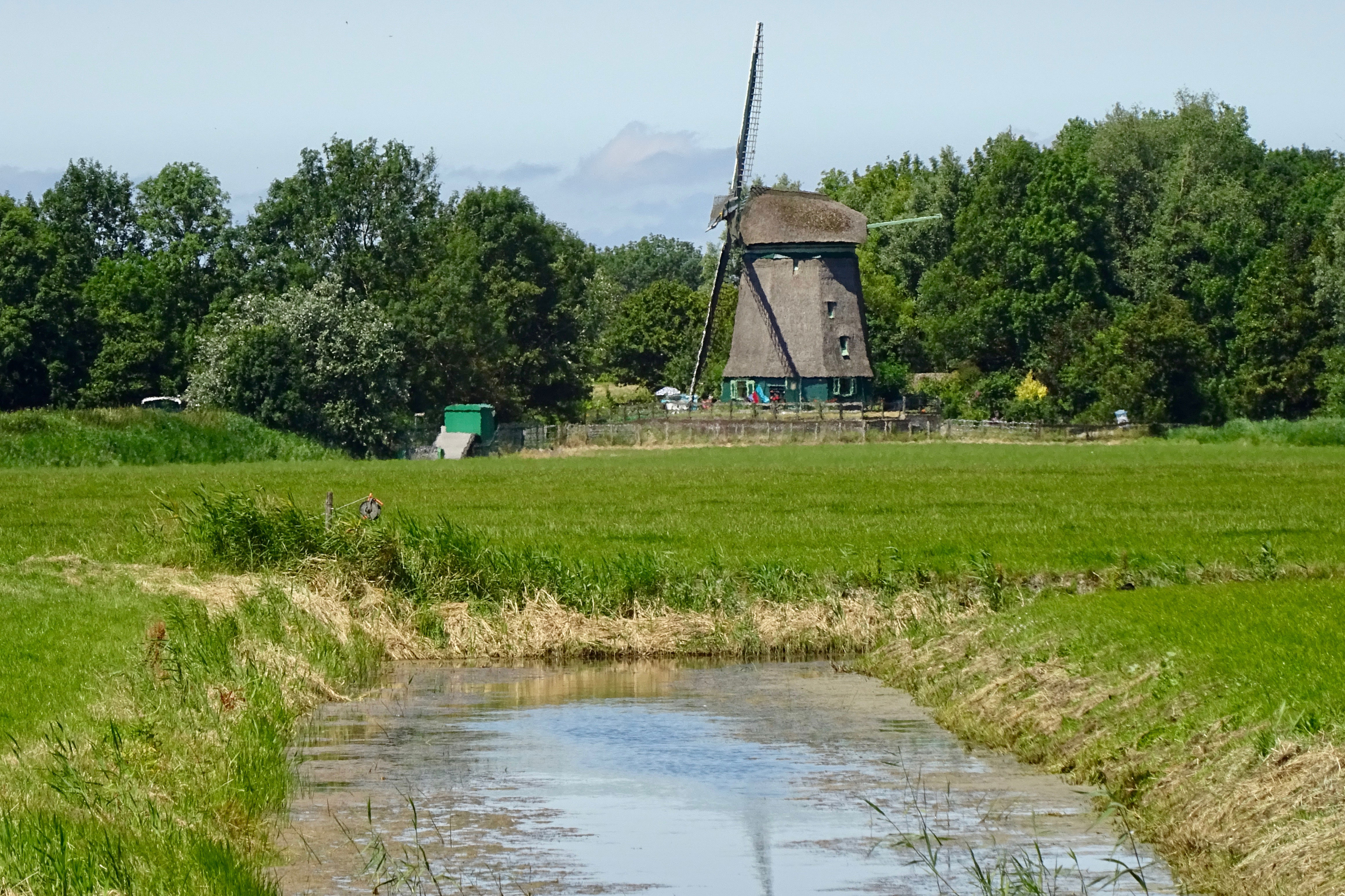 Molen Westuit nr. 7 nabij Aartswoud gezien vanaf 't Blôte Bienepad